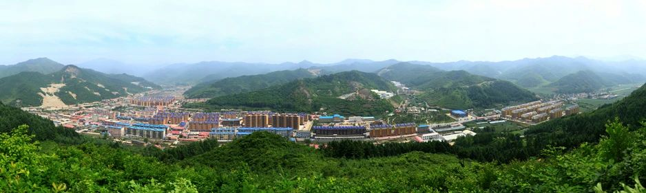 中文（中国大陆）: 辽宁省丹东市凤城市青城子镇全景